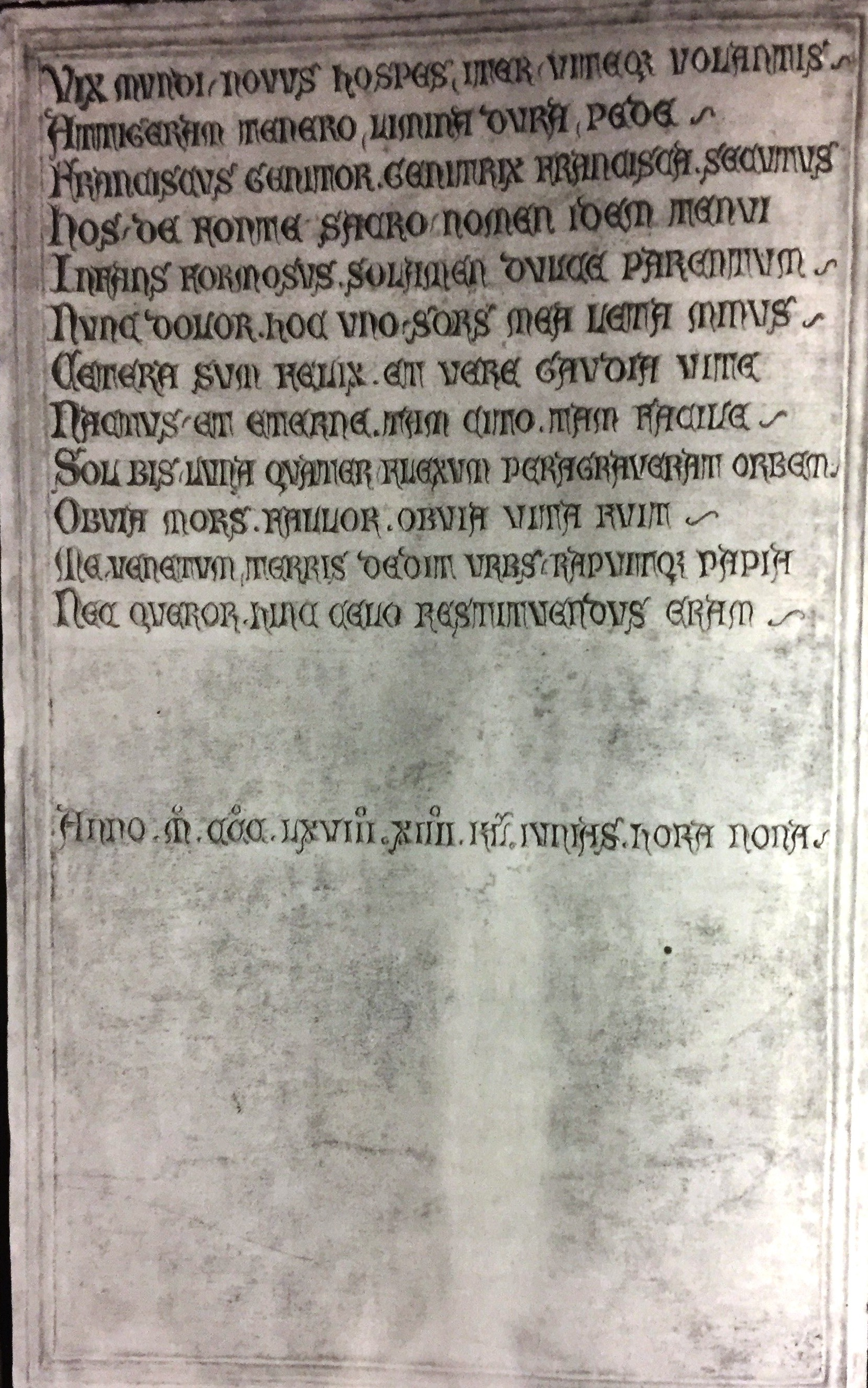 epigrafe